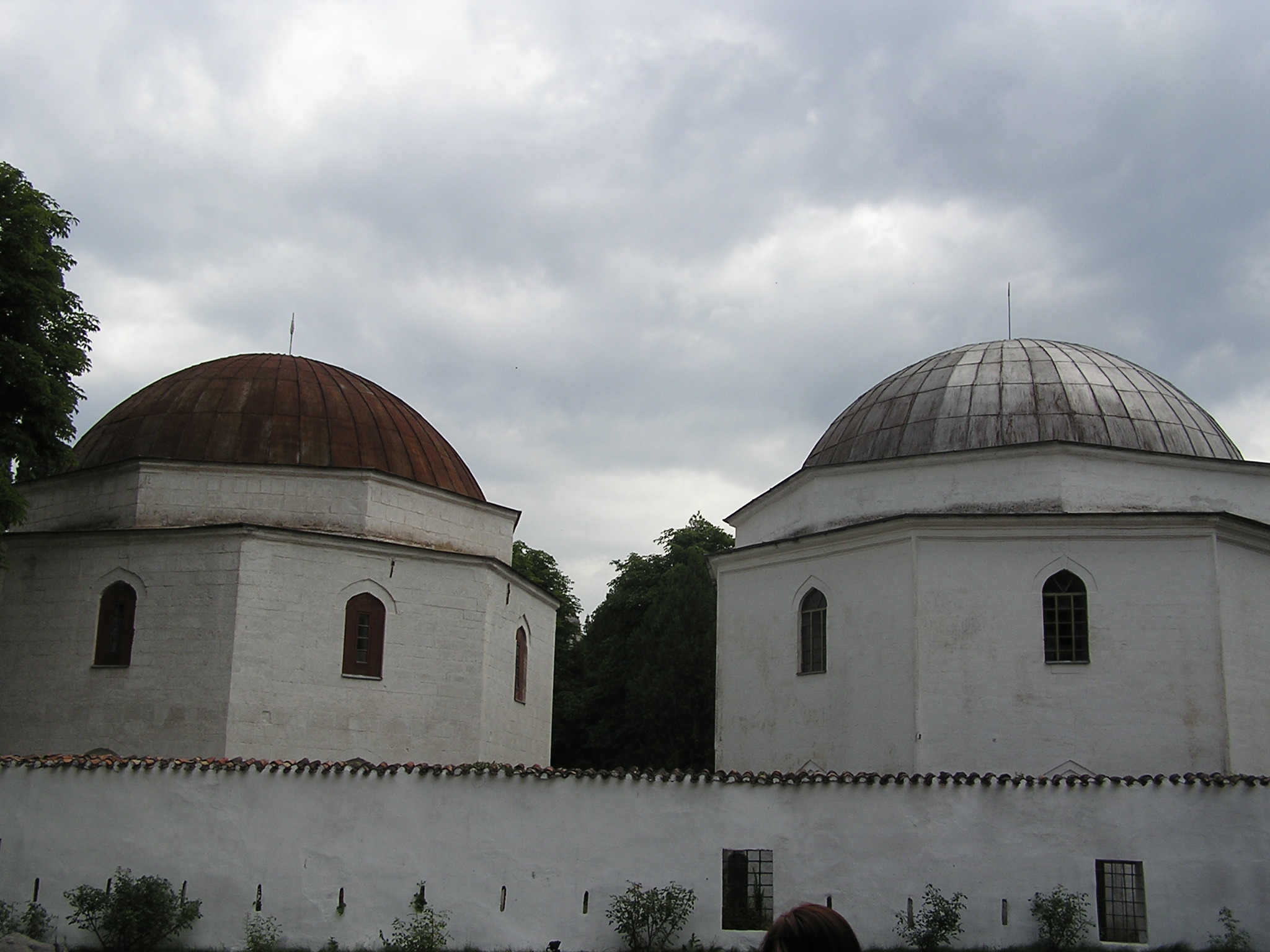 Бахчисарайский дворец. Северное и южное дюрбе